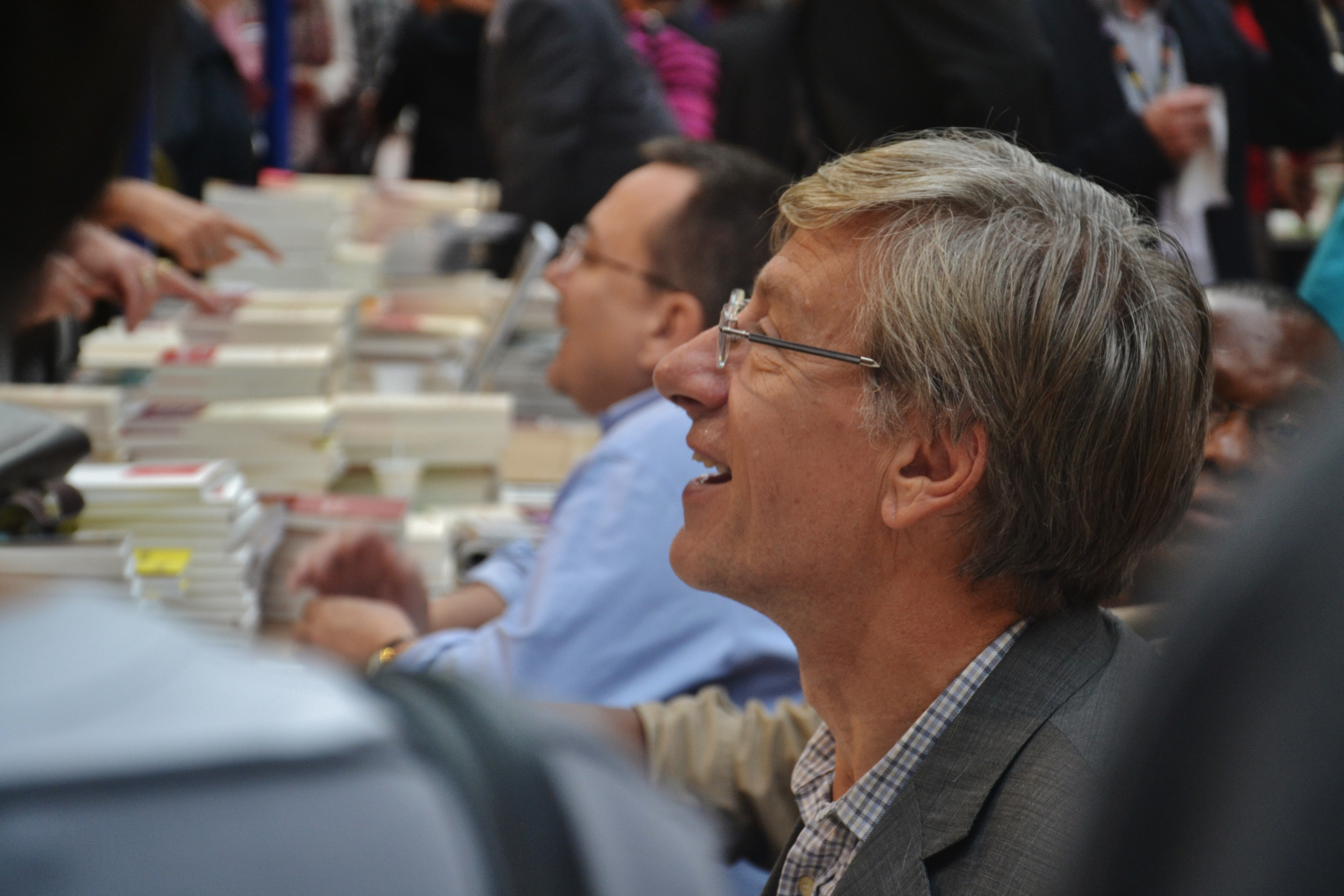 Jean-Christophe Rufin à la 30e Foire du livre de Brive-la-Gaillarde